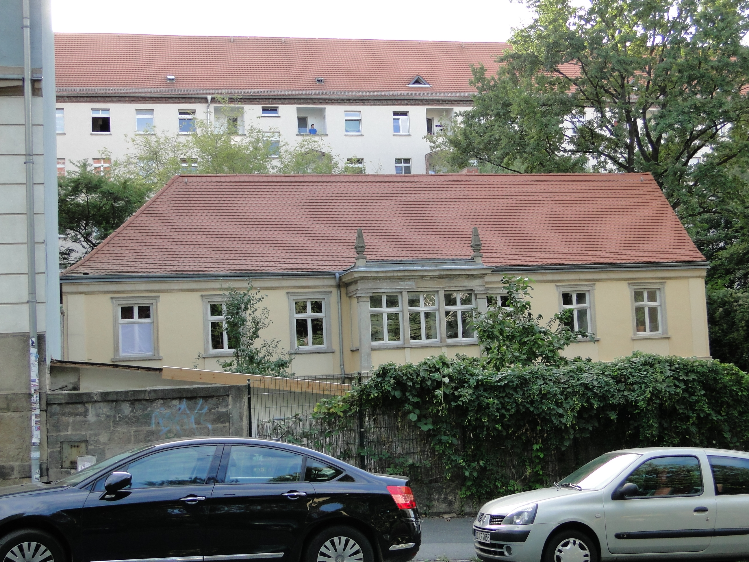 Kulturdenkmal Rudolfstraße 9 Dresden